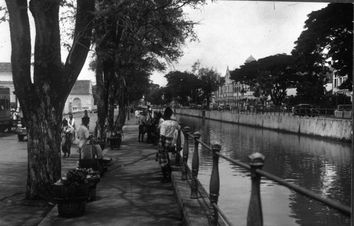 Foto. De Molenvliet op de grens van Noordwijk en Rijswijk te Batavia